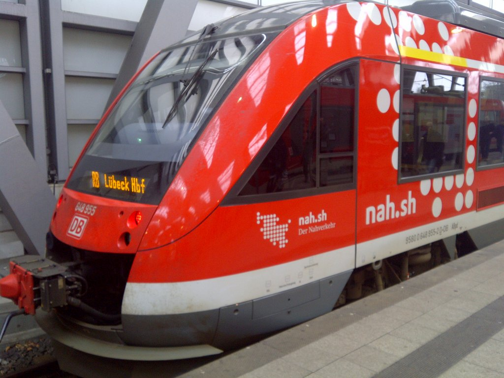 LINT-Triebwagen 648 472 im Design der Regionalbahn Schleswig-Holstein in Kiel Hbf.